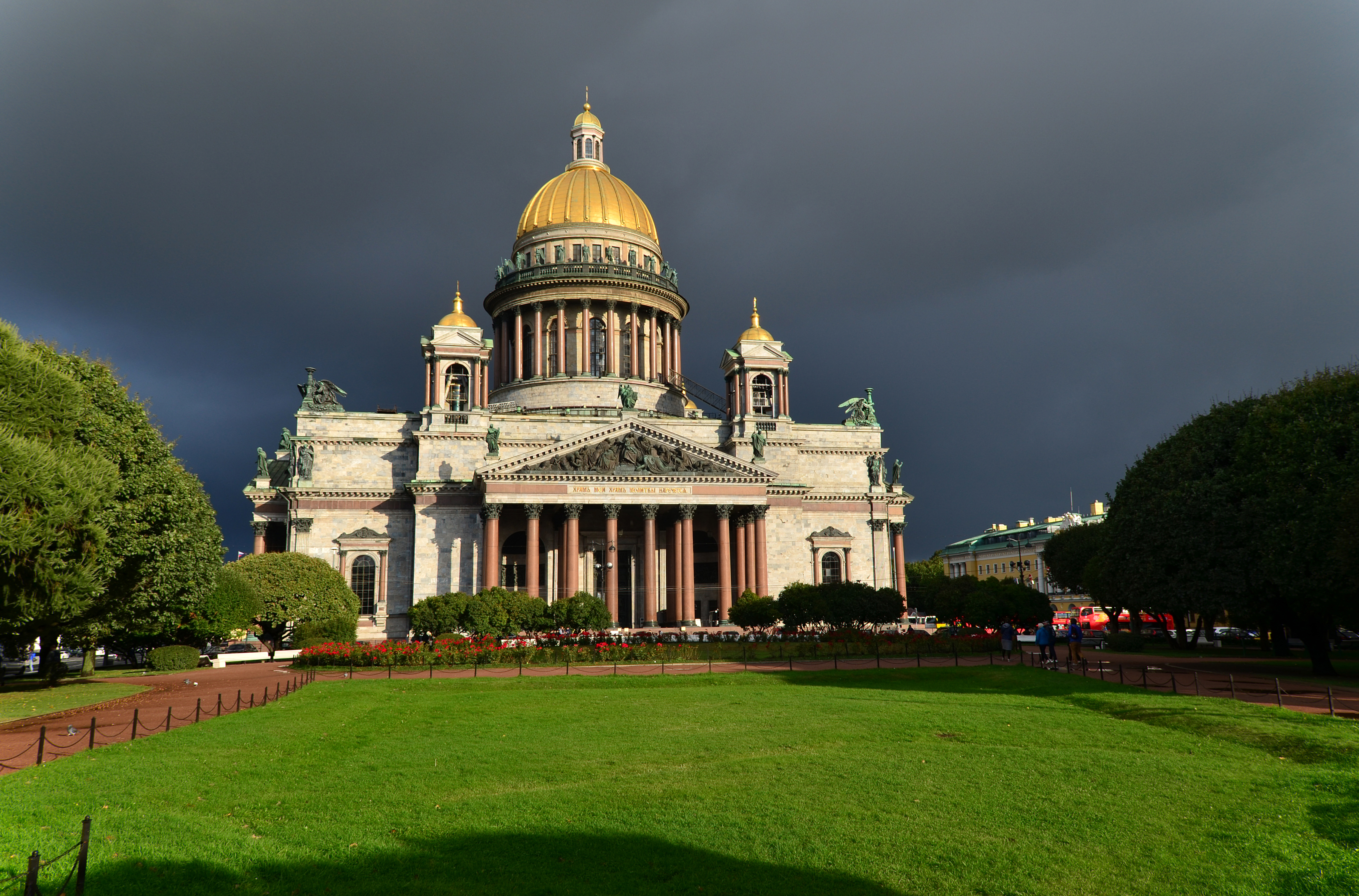 Санкт-Петербург.Исаакиевский собор.